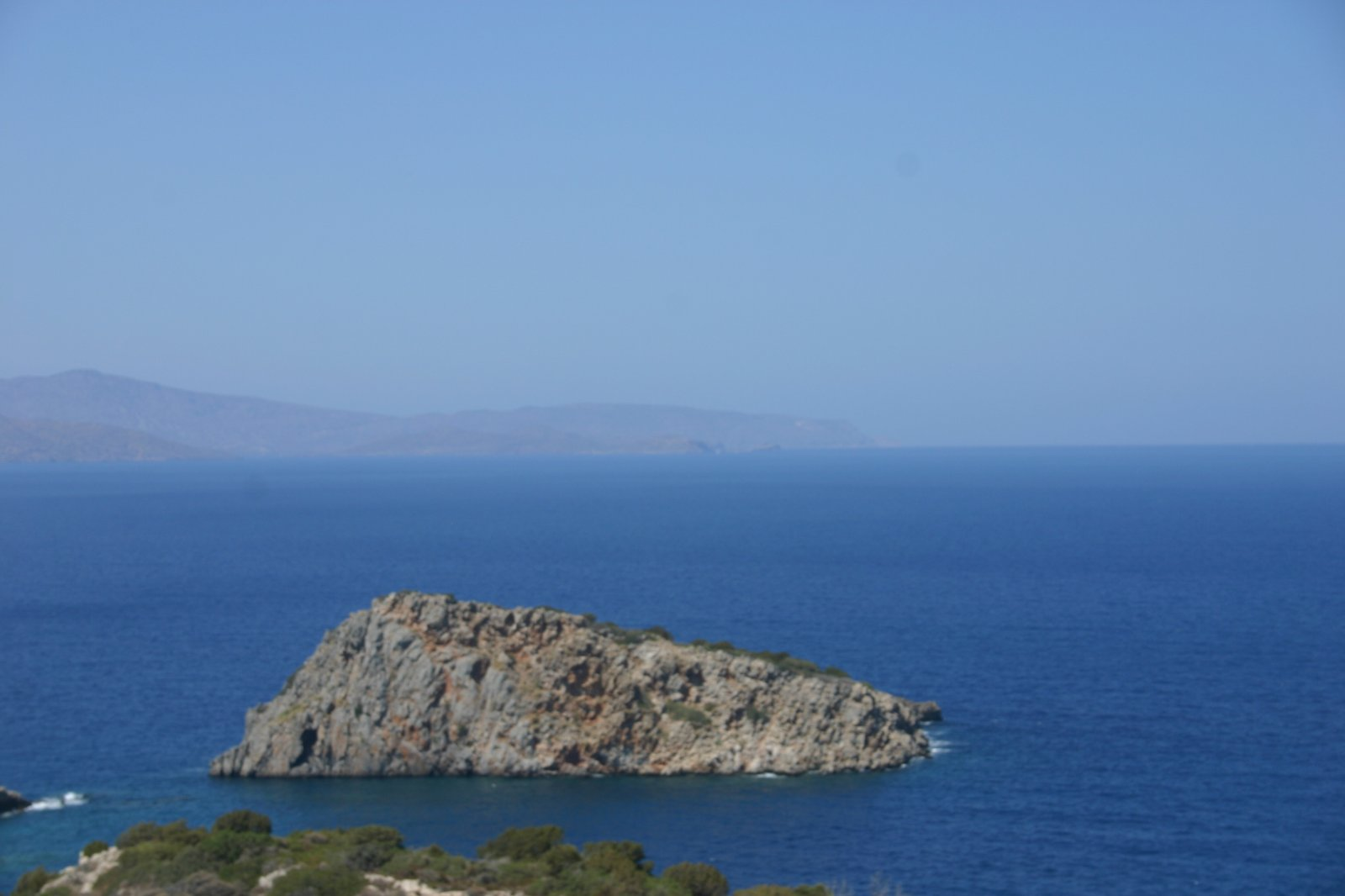 Vryonisi islet, Agios Nikolaos, Crete, Greece